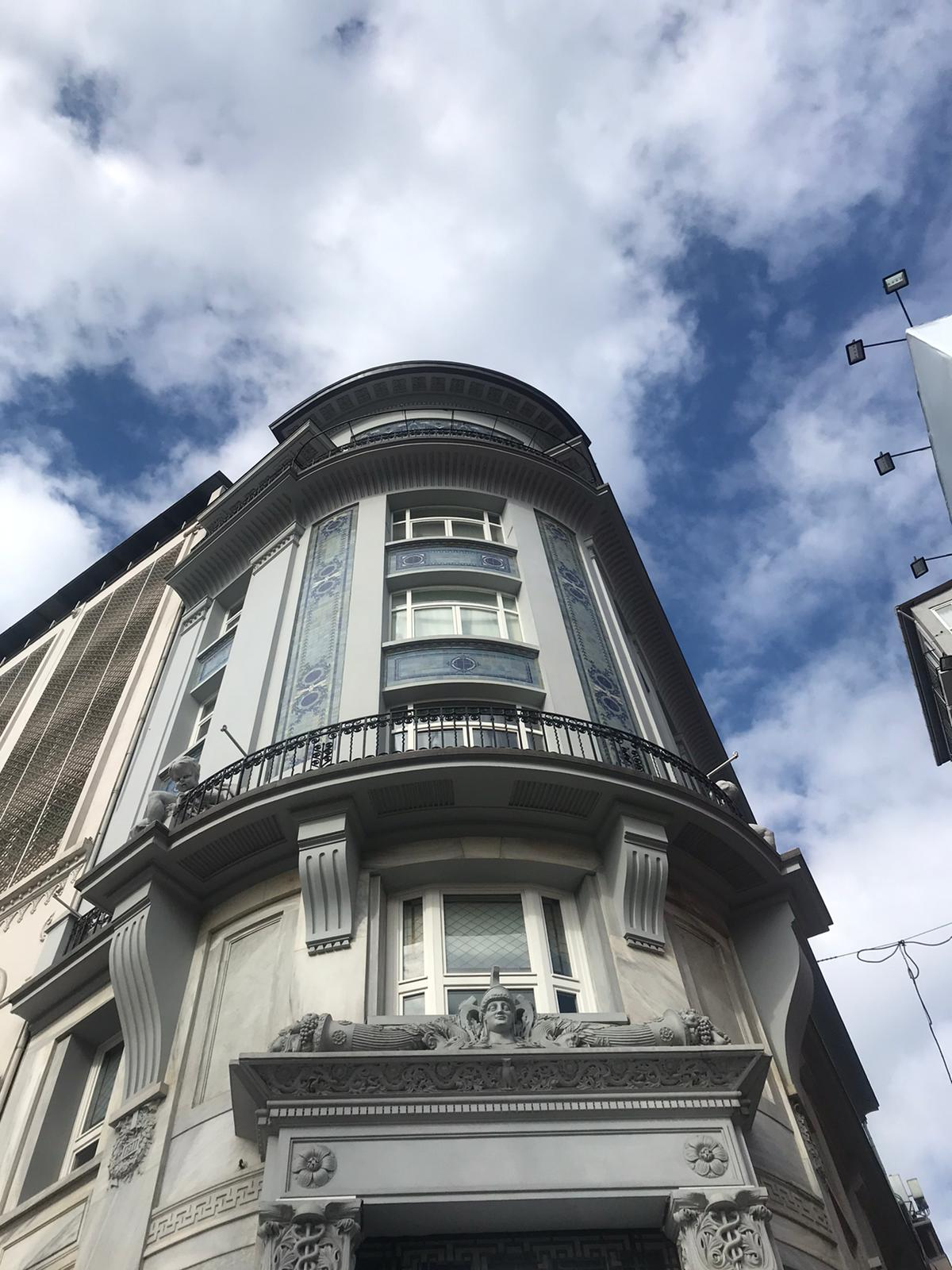 Karaköyde bulunan ve hâlâ işleyen Minerva Han